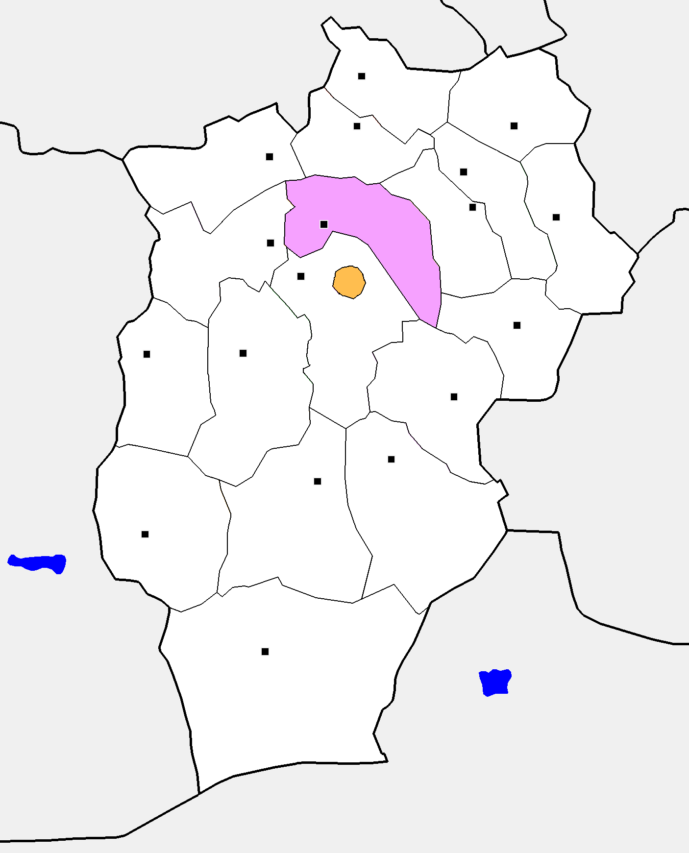 Монгол: Өвөрхангай аймгийн Зүүнбаян-Улаан сумын байршил